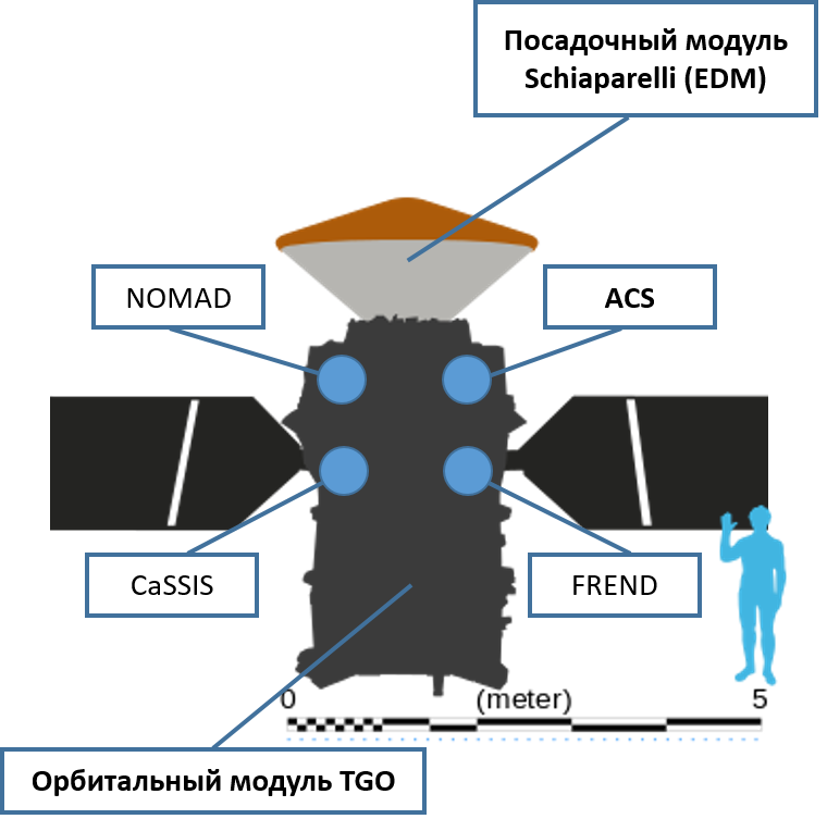 Орбитальный и посадочный модули миссии ExoMars 2016 с указанием расположения научных инструментов на модуле TGO.